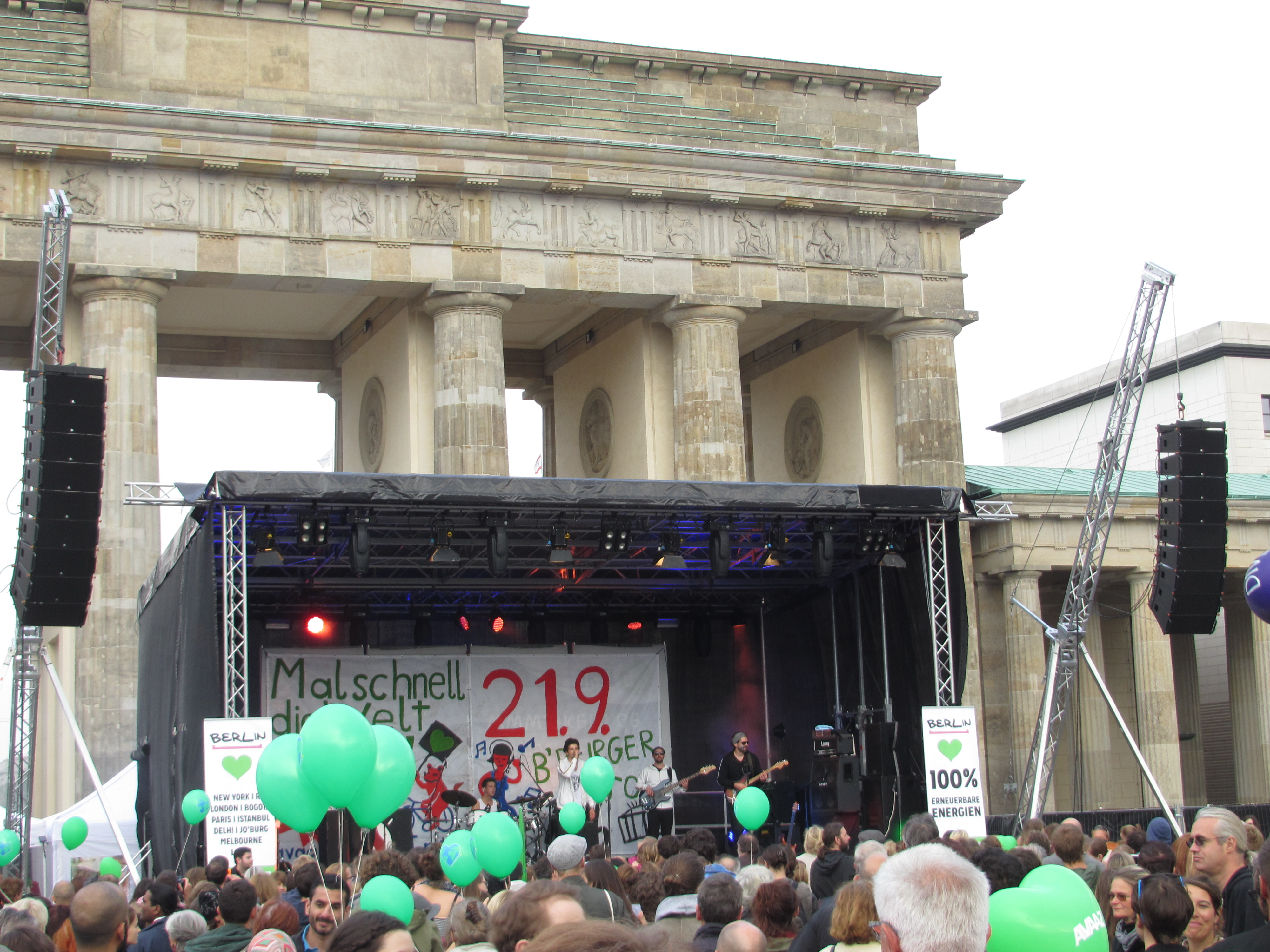 "Mal schnell die Welt retten" - Globale Klima-Demo, großer Klima-Aktionstag, Berlin am 21. September 2014